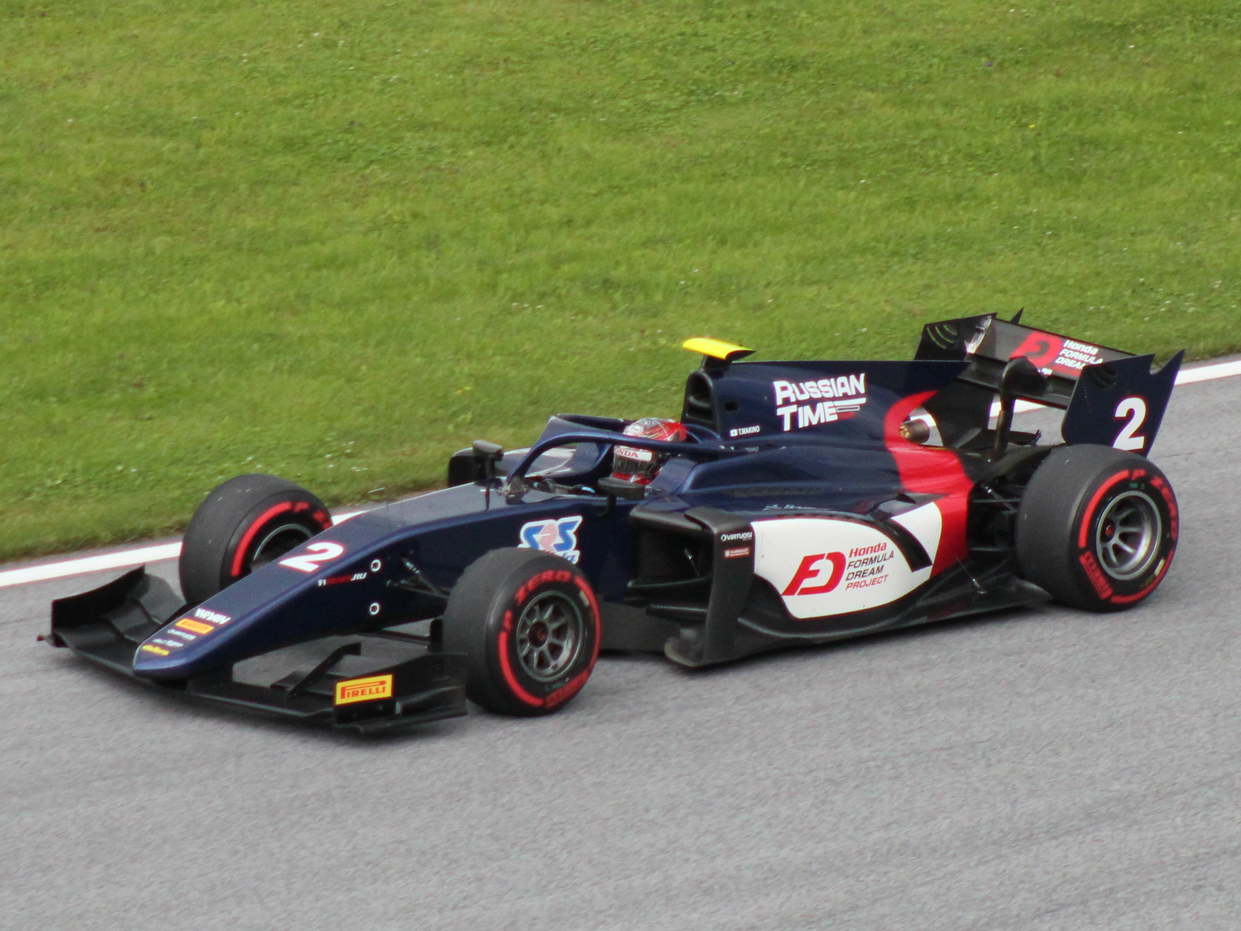 02 Tadasuke Makino beim Rennwochenende in Österreich 2018 (1)